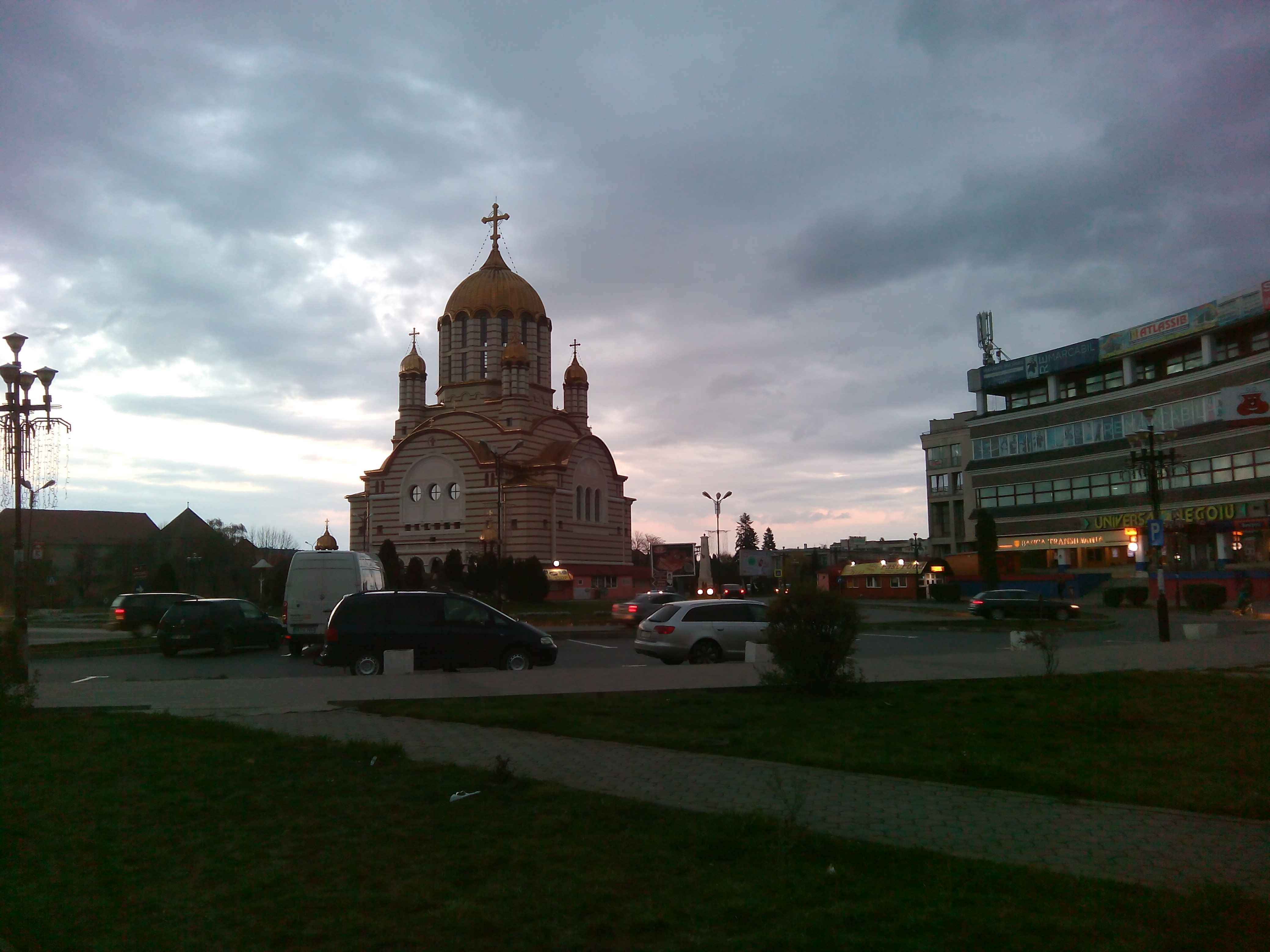 Fogaras ortodox templom